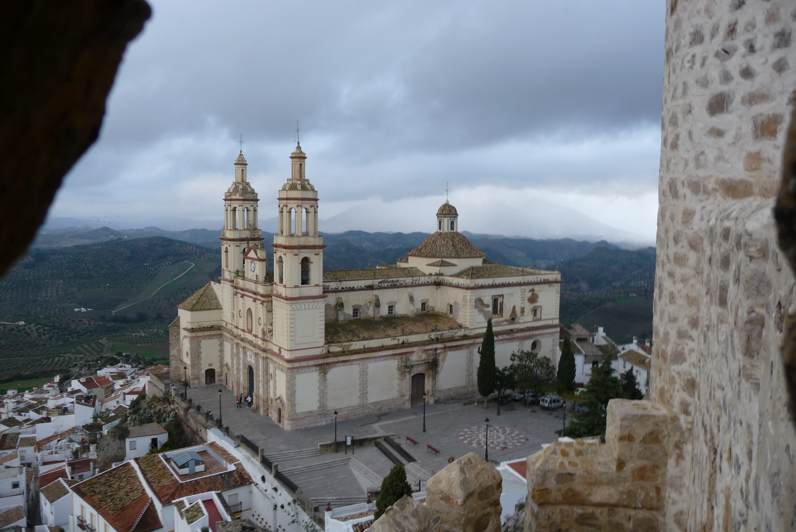 Olvera-p1000547.jpg